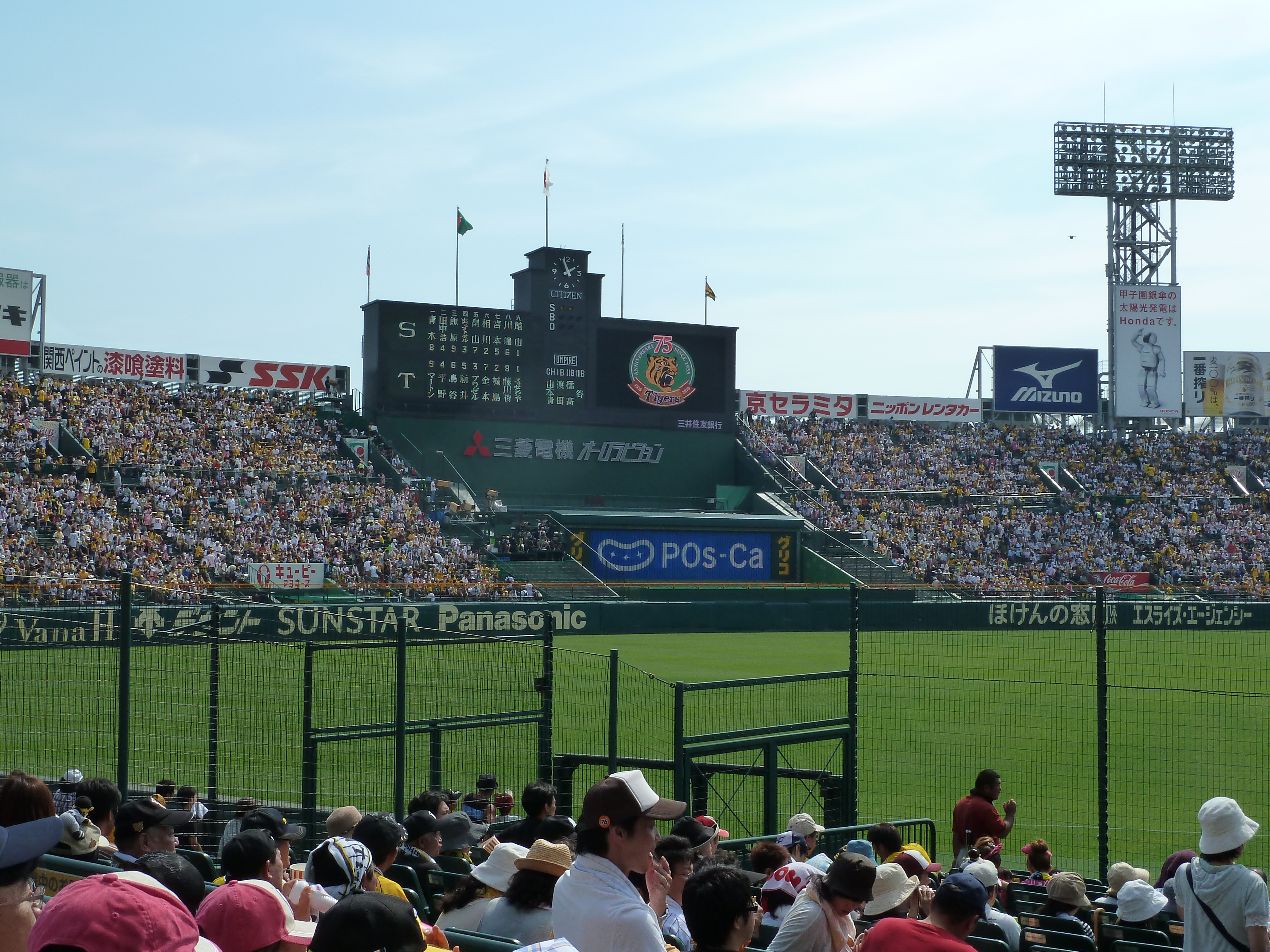 Eye-Fiからアップロードされました